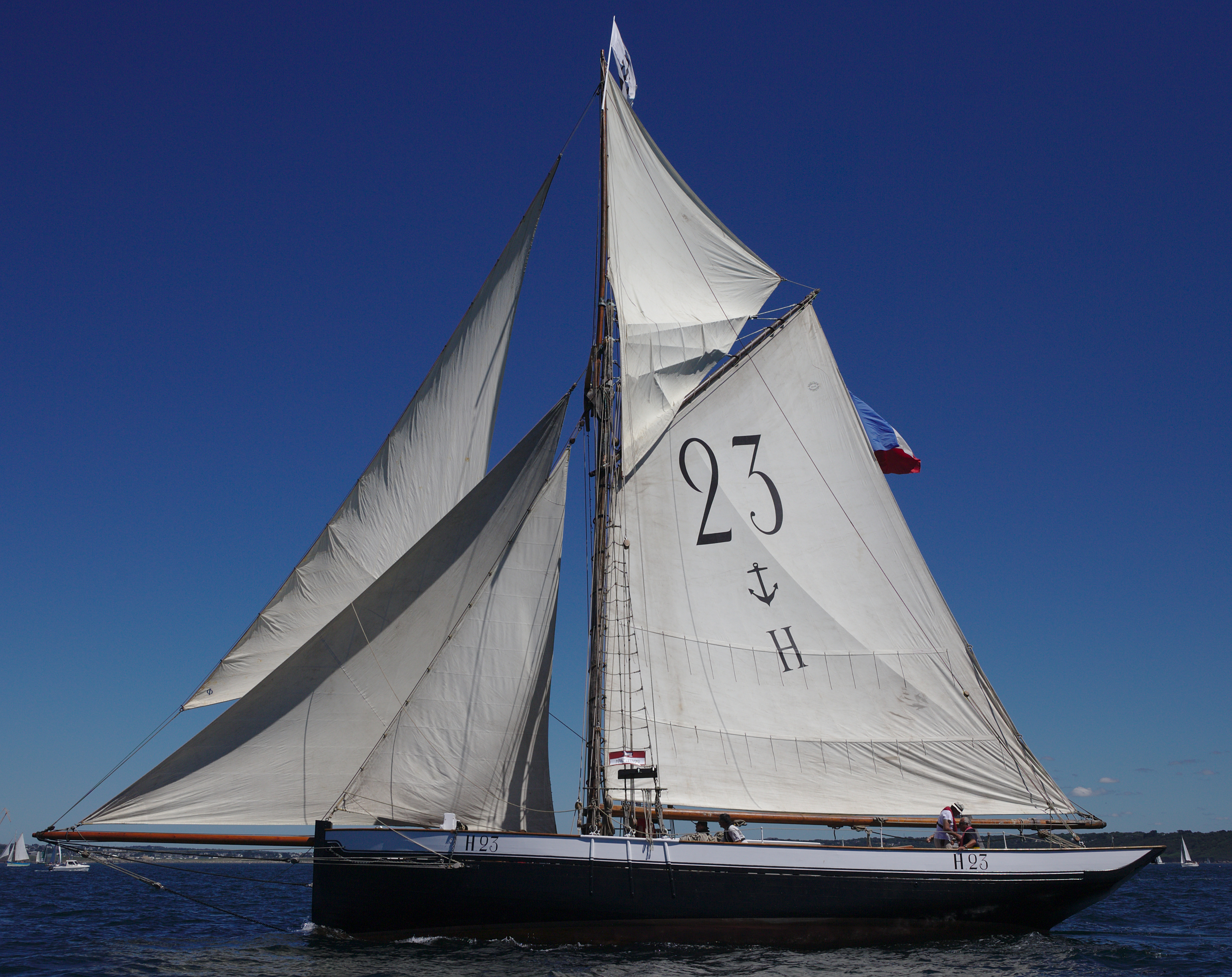 Le Marie-Fernand à Brest 2016.